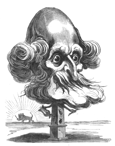 Portrait satirique de Paulin Gagne.